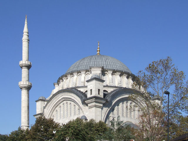 Nuruosmaniye Mosque